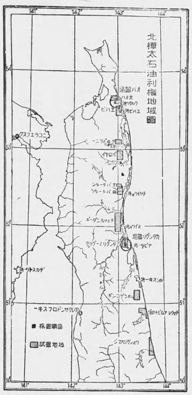 北樺太石油の採掘地点と試掘地域